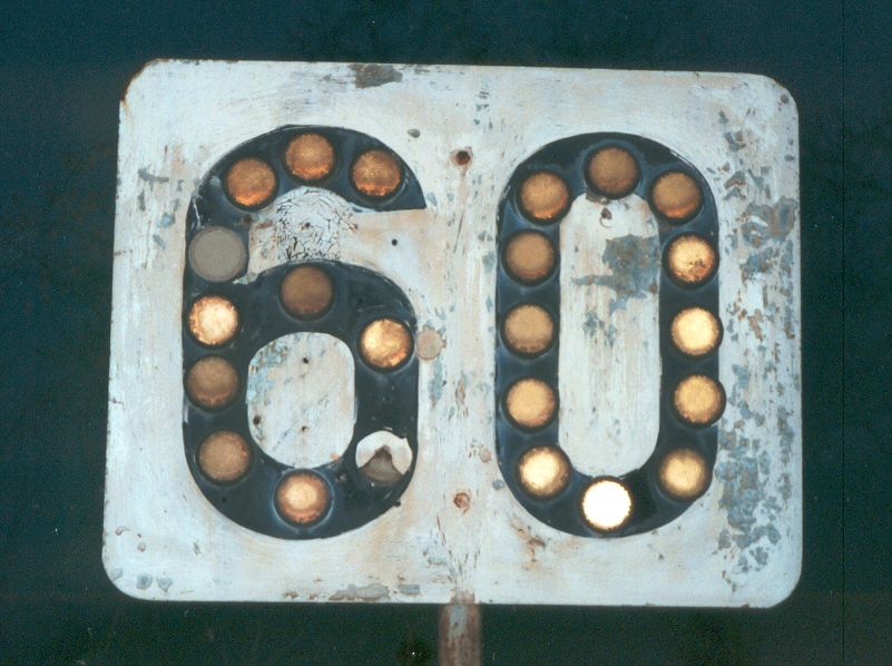 Praha Zbraslav 2001